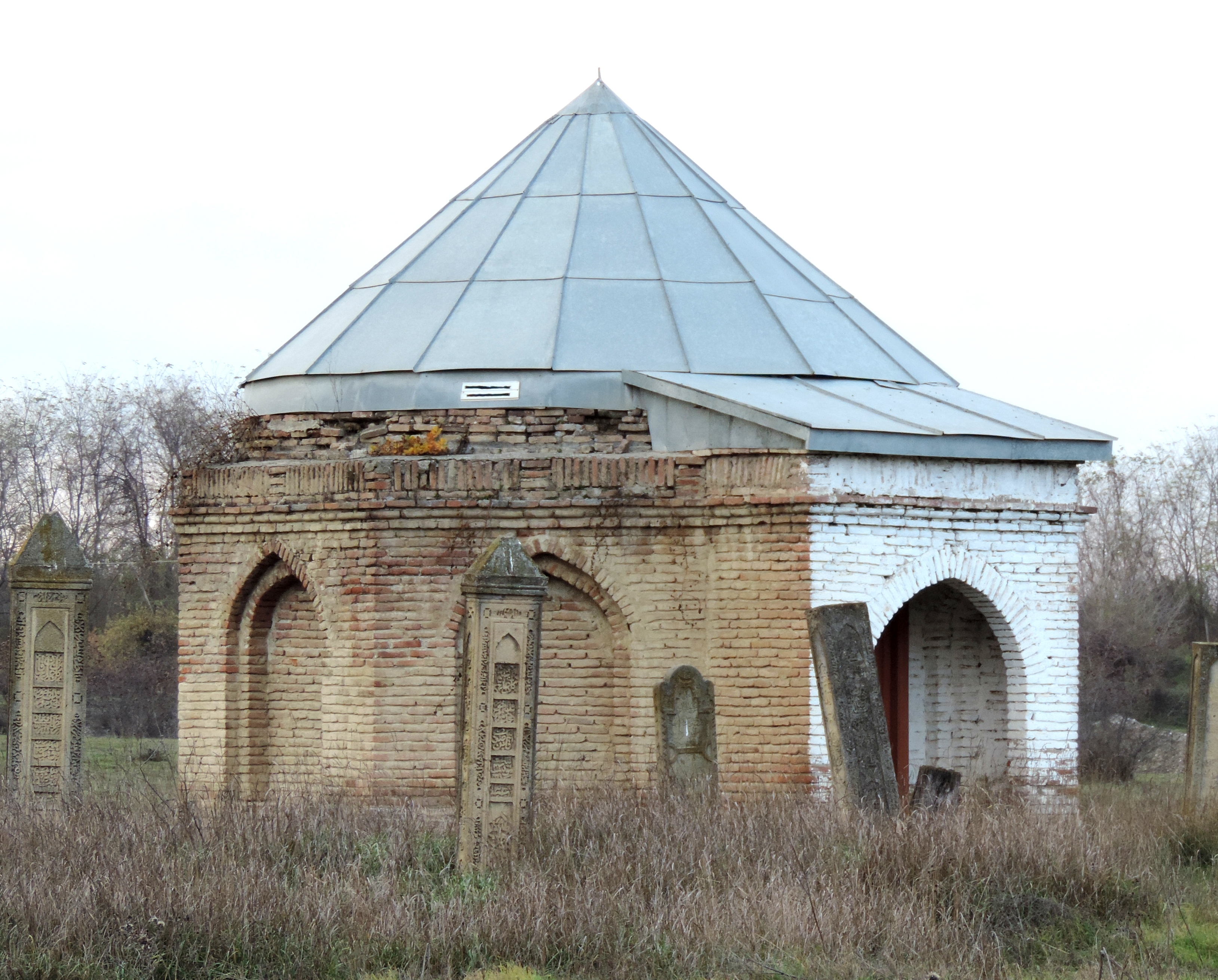 Şeyx Yusif türbəsi